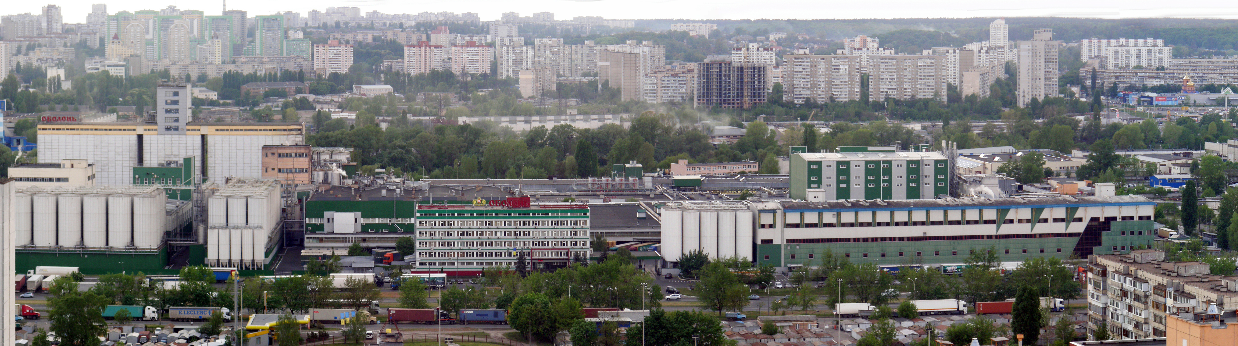 пивзавод «Оболонь»